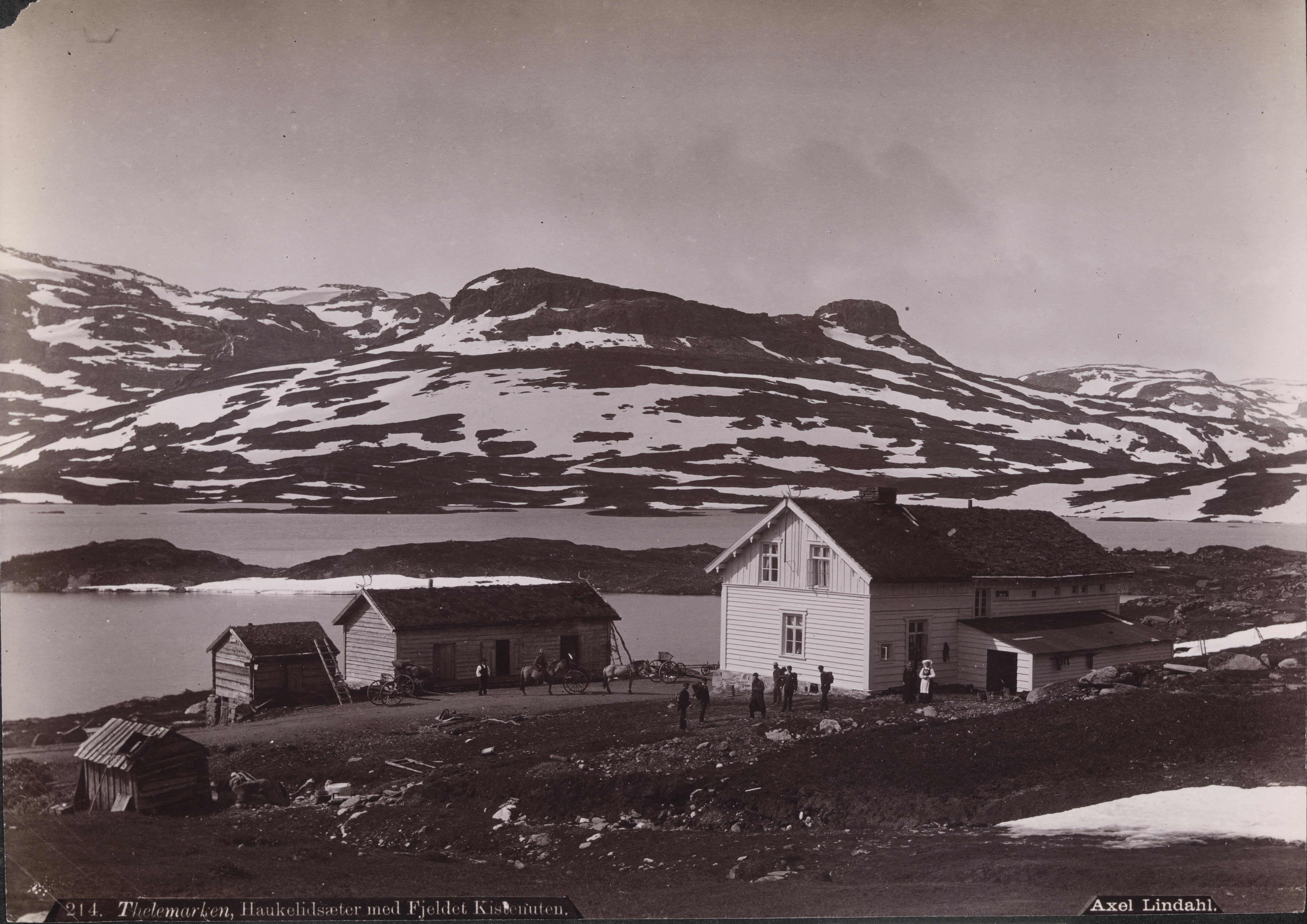 Thelemarken, Haukelidsæter med Fjeldet Kistenuten Sted: Kommune: Fylke: Tagger: landskapsfotografi